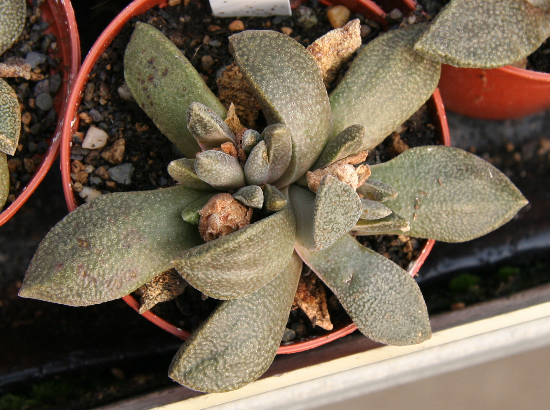 Aloinopsis rubrolineata in Kultur bei Kakteen-Haage in Erfurt